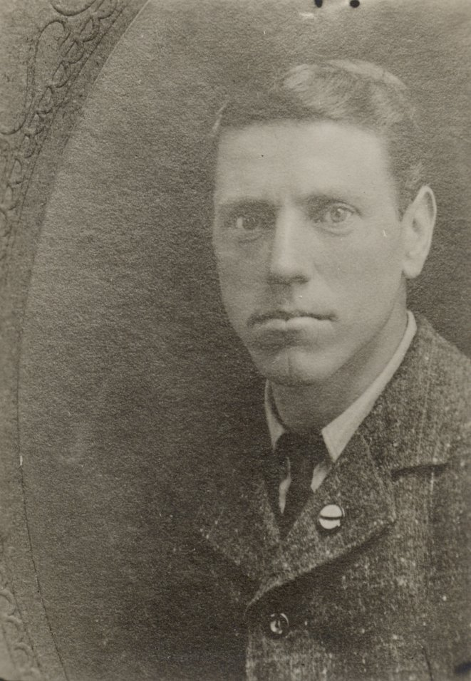 Jack Fitzgerald